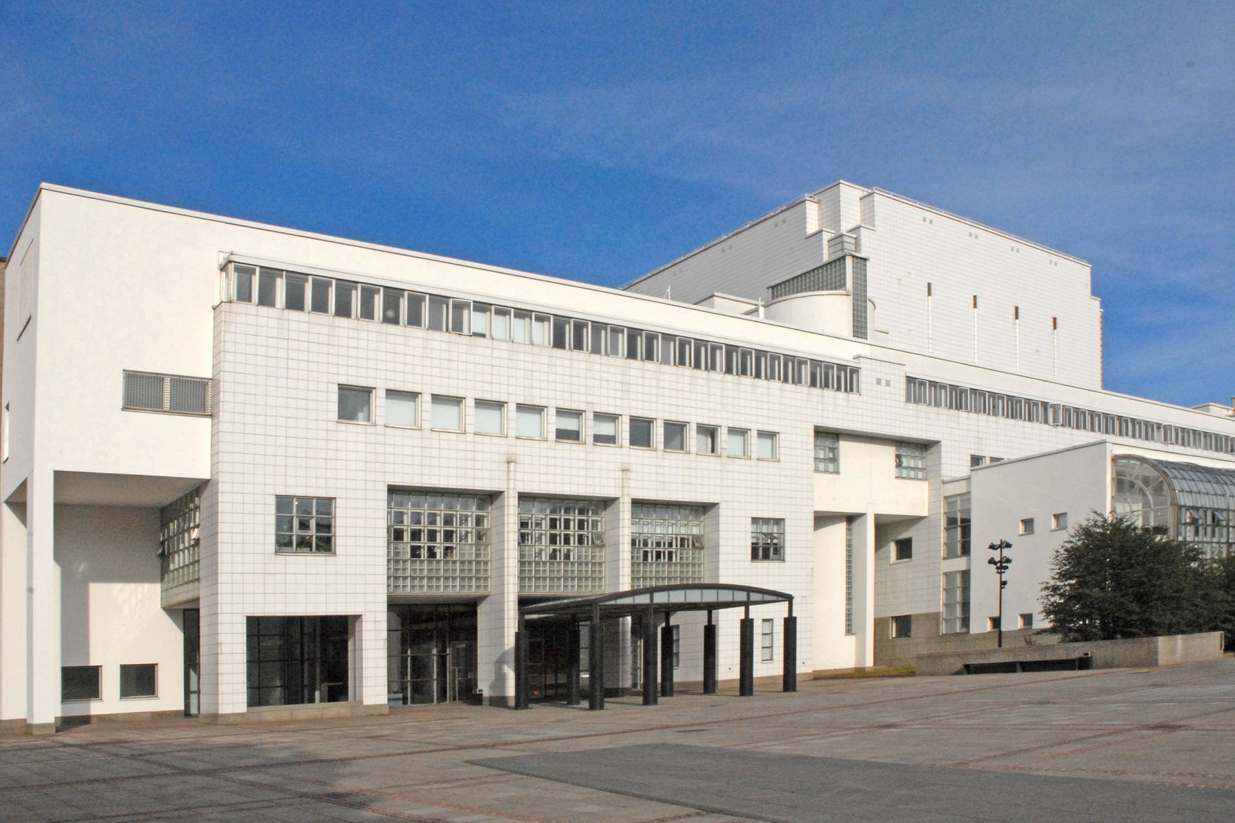 Le bâtiment de l'opéra a été achevé en 1993 Architectes : E. Hyvämäki, J. Karhunen, R. Parkkinen